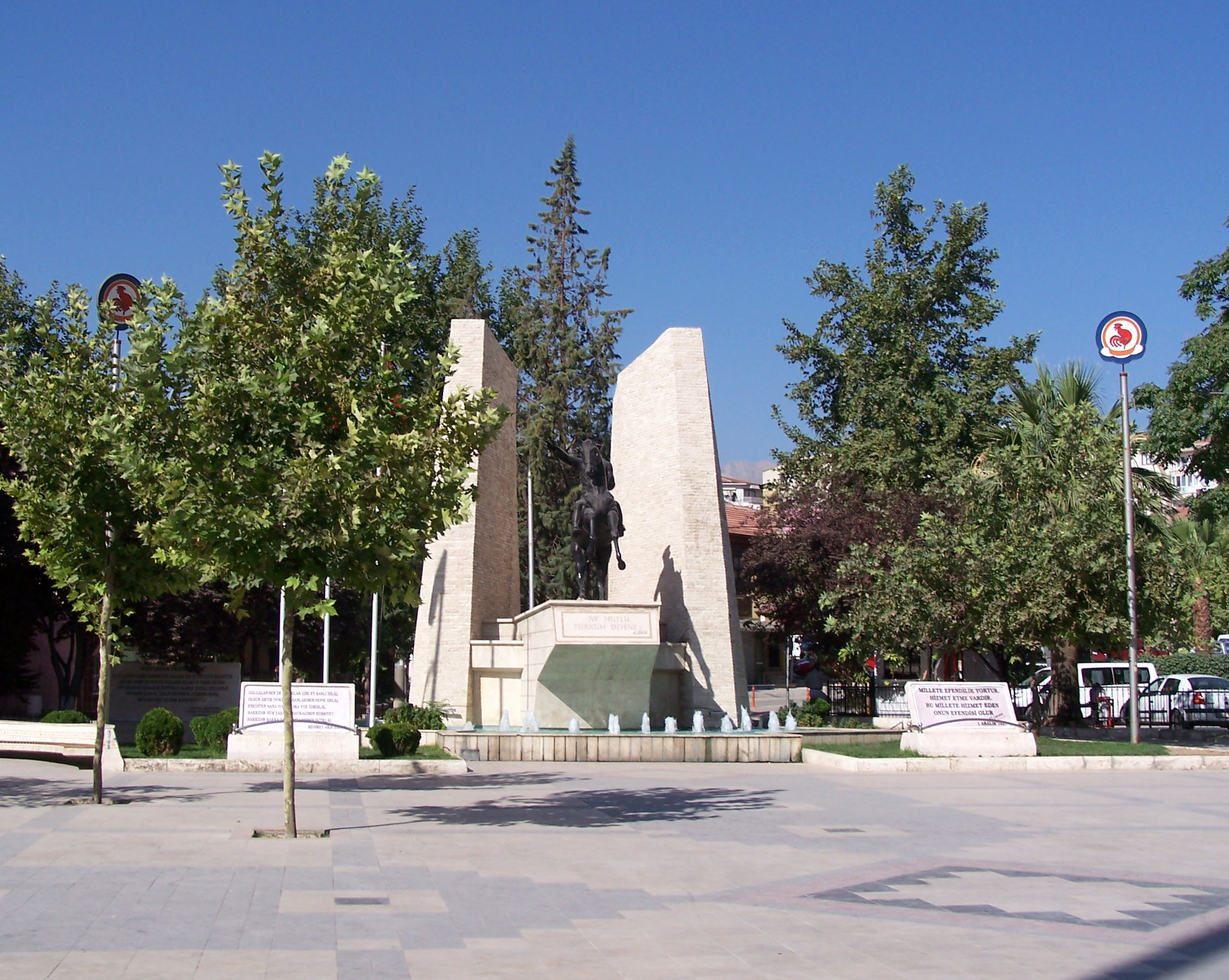 Statue of Mustafa Kemal Atatürk in Denizli, Turkey